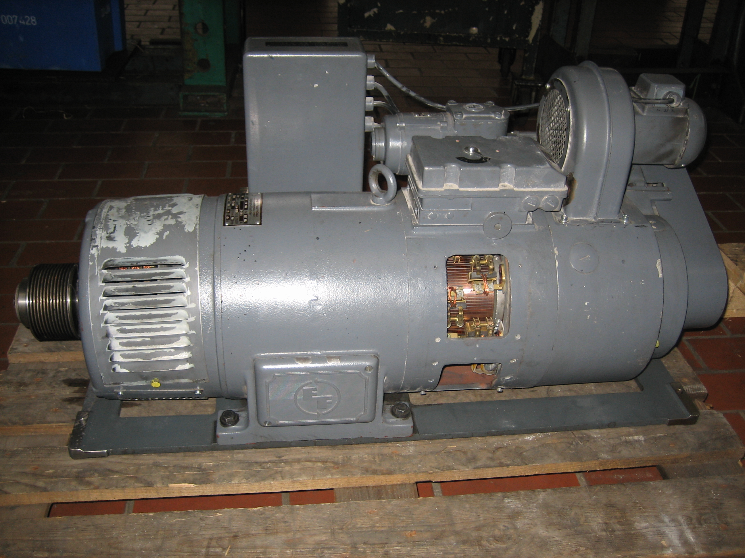 Drehstromnebenschlussmotor